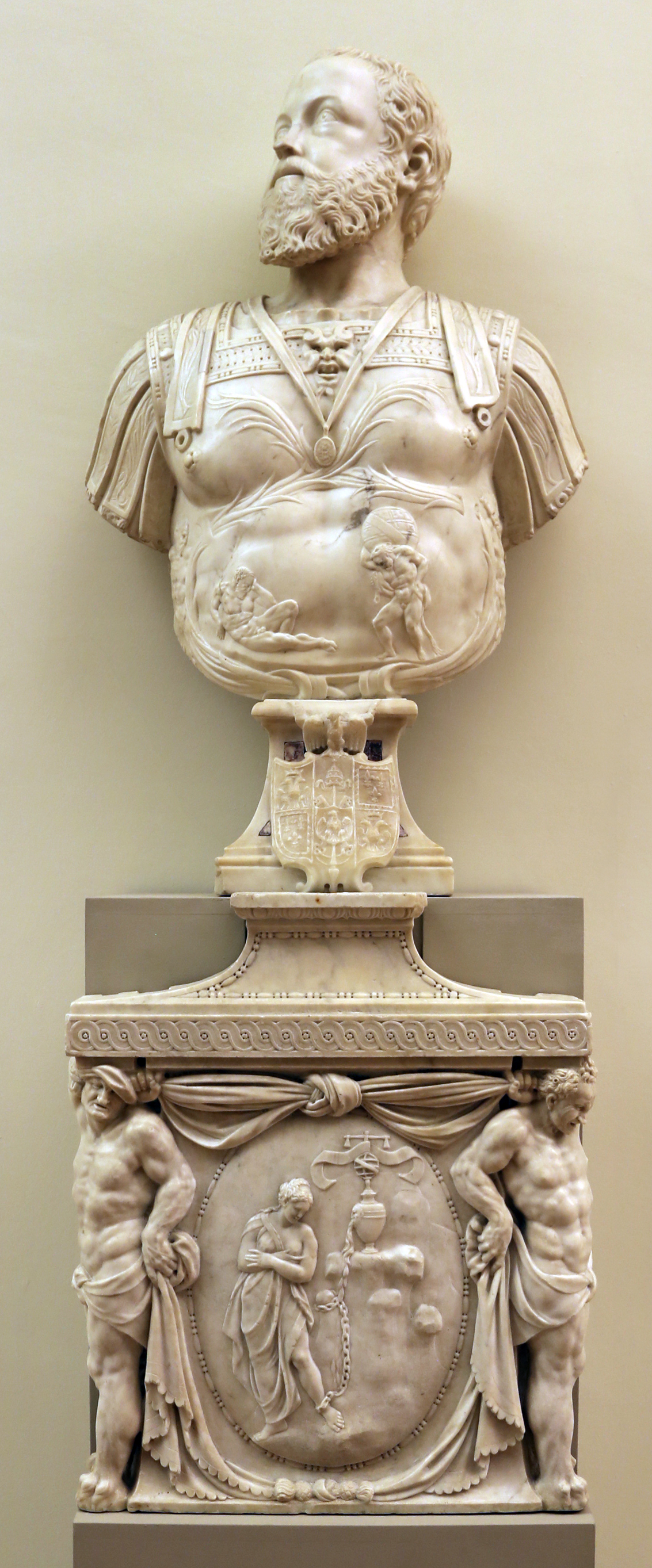 Palazzo dei Musei (Modena) This is a photo of a monument which is part of cultural heritage of Italy.